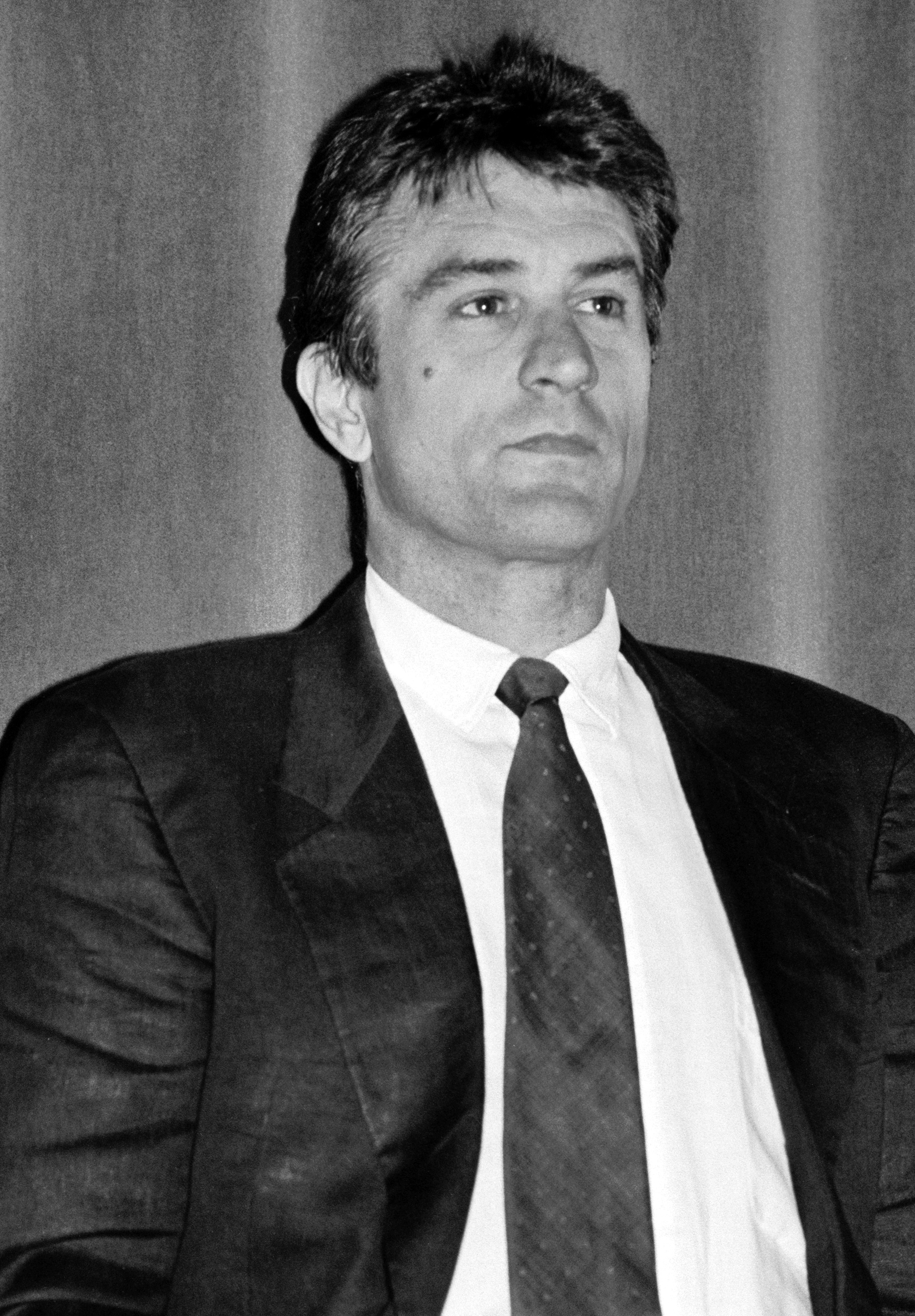 L'acteur américain Robert De Niro au Festival du cinéma américain de Deauville (Calvados, Basse-Normandie, France).